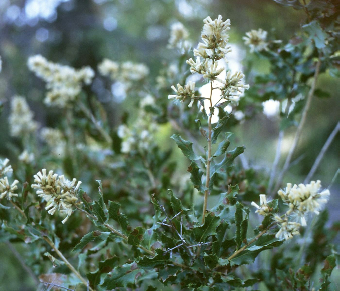 Proustia cuneifolia var. mendocina, Korbblütler (Asteraceae) - Argentinien/Argentina, Mendoza, Cerro de la Gloria (Prov. Mendoza)